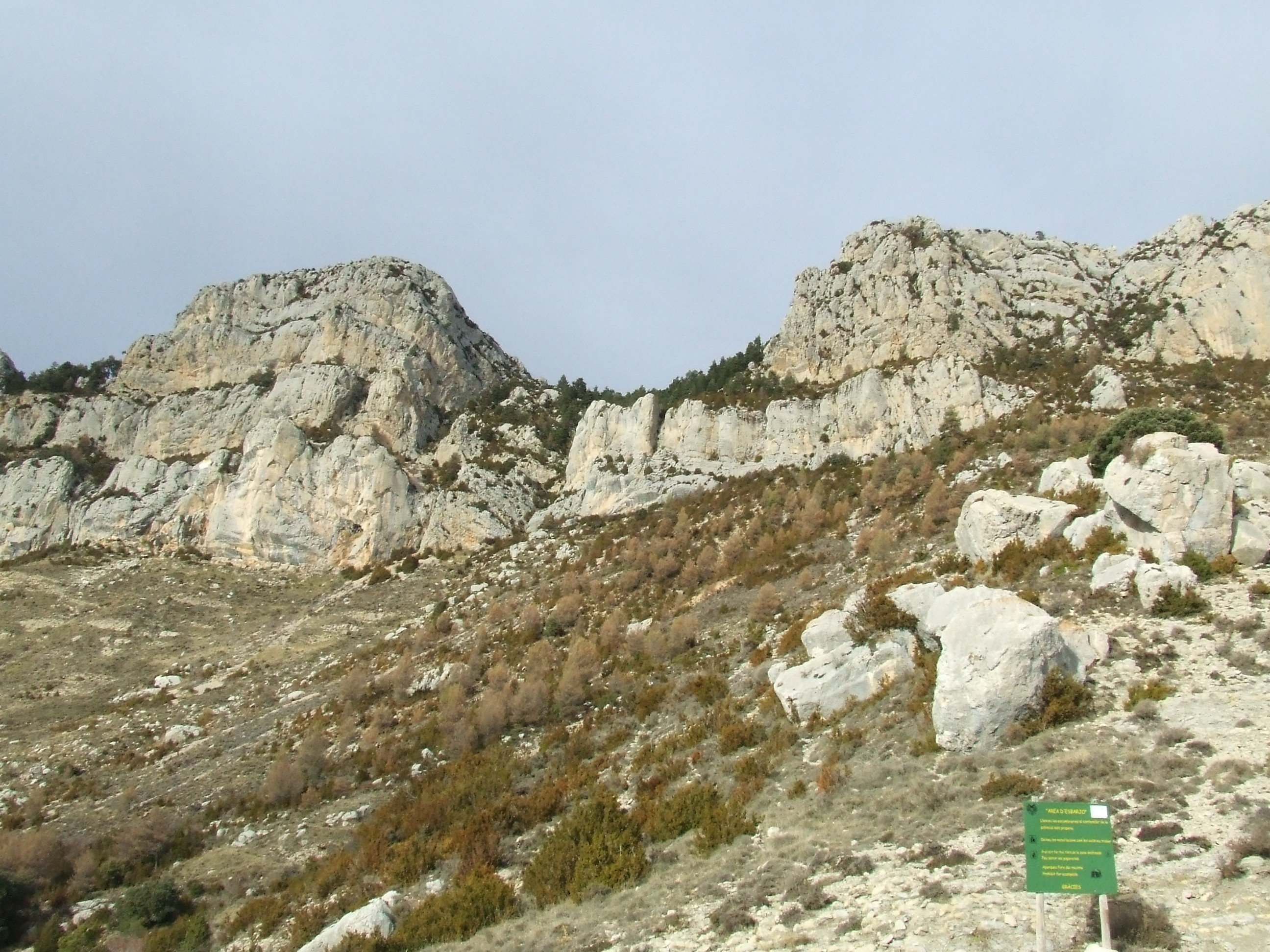 Cap de Carreu i Pas de Castellnou, a la Serra de Carreu (Abella de la Conca, Pallars Jussà)